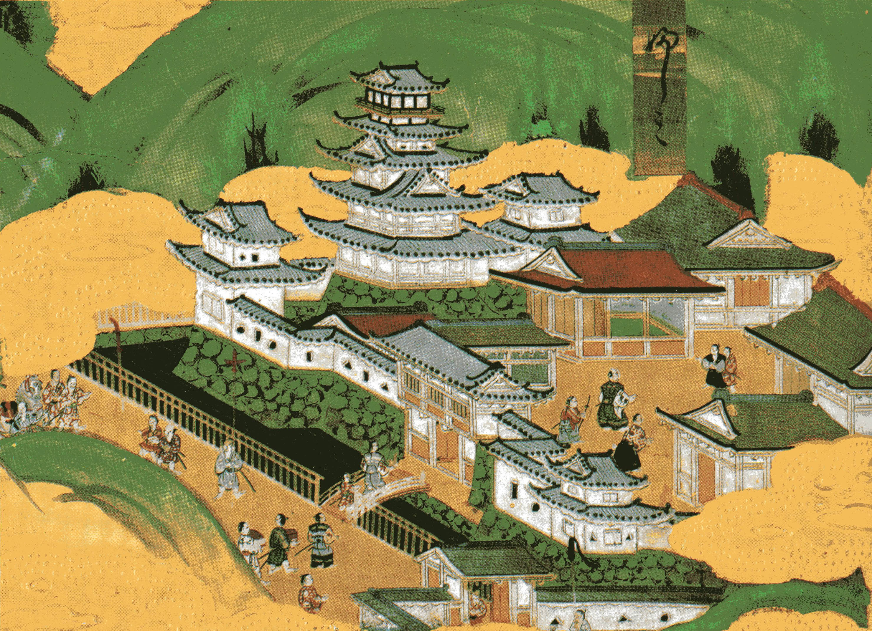 洛中洛外図屏風（池田本・一部）